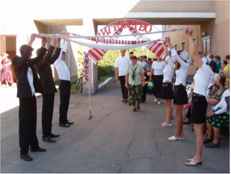 Щасливі першачки.